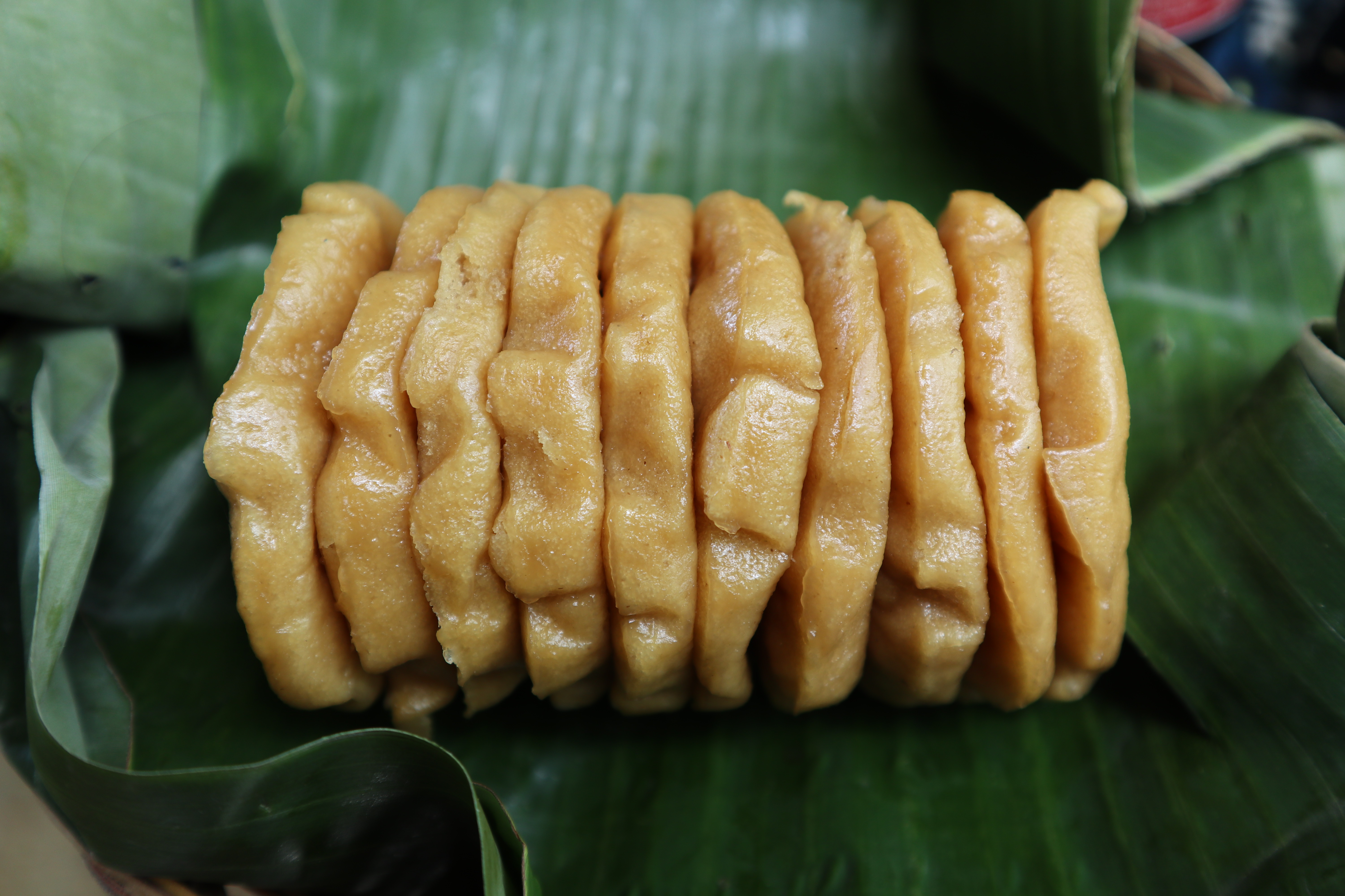 Wadai apam khas Barabai, Kalimantan Selatan.